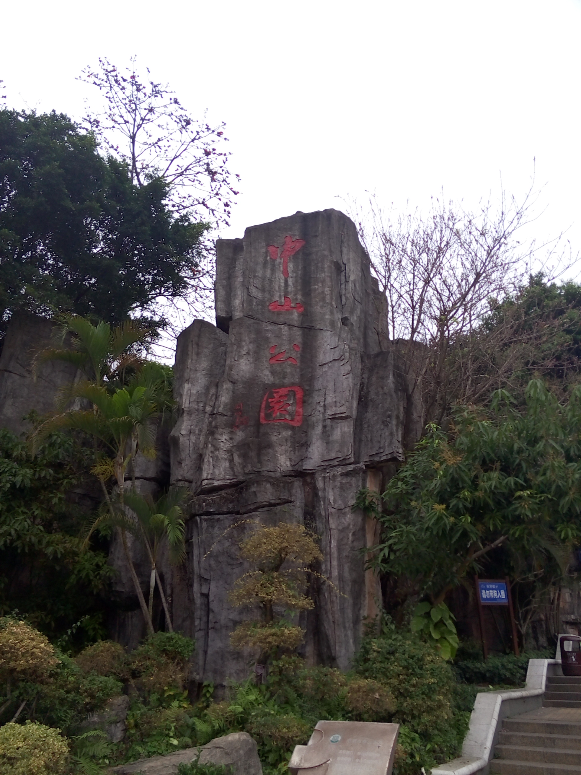 Shenzhen